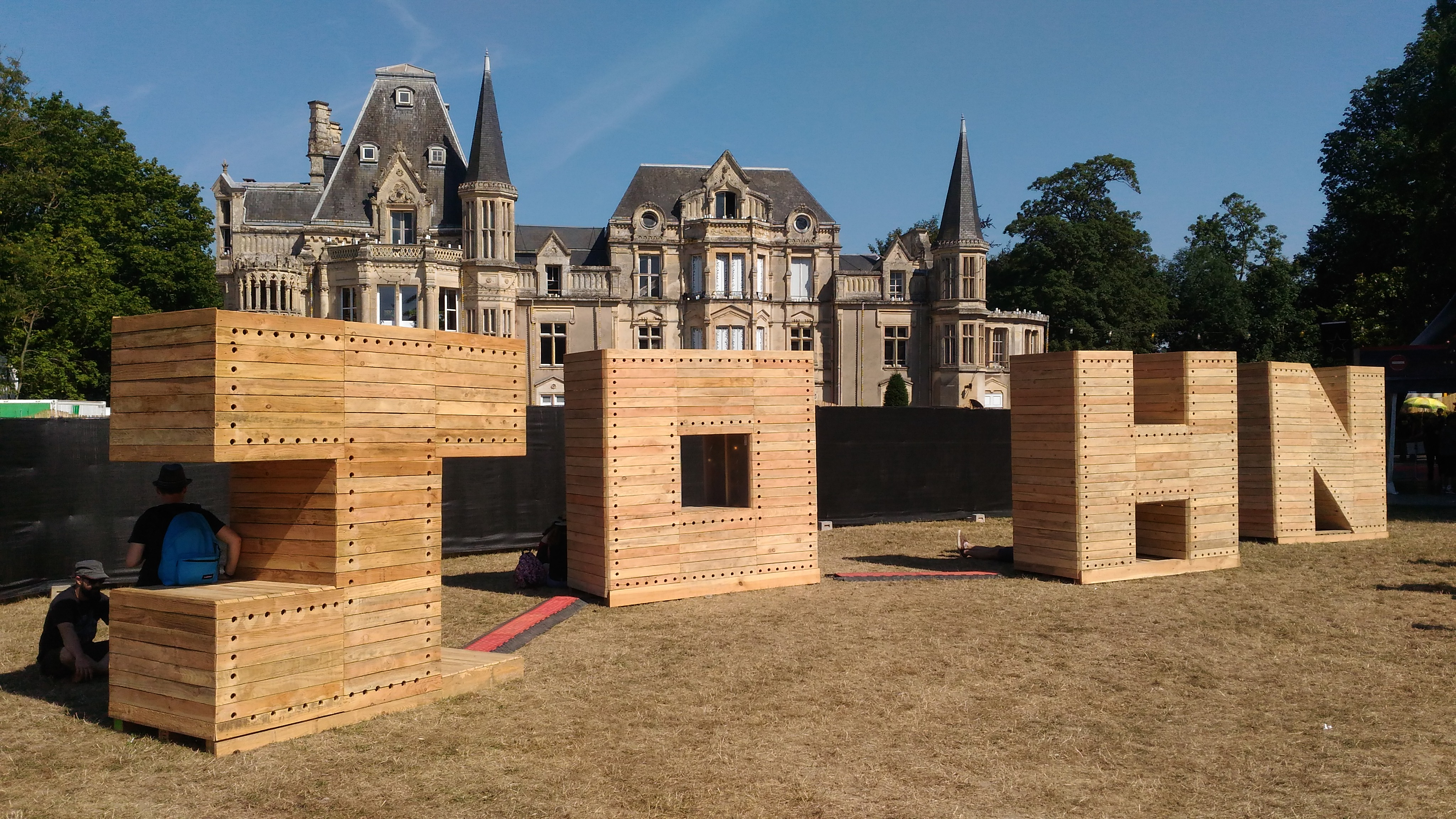 Château de Beauregard festival 2018